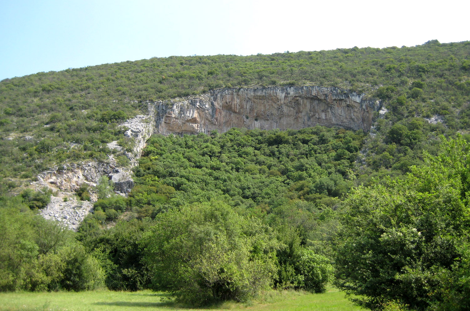 Mišja peč, climbing area near Osp, Slovenia